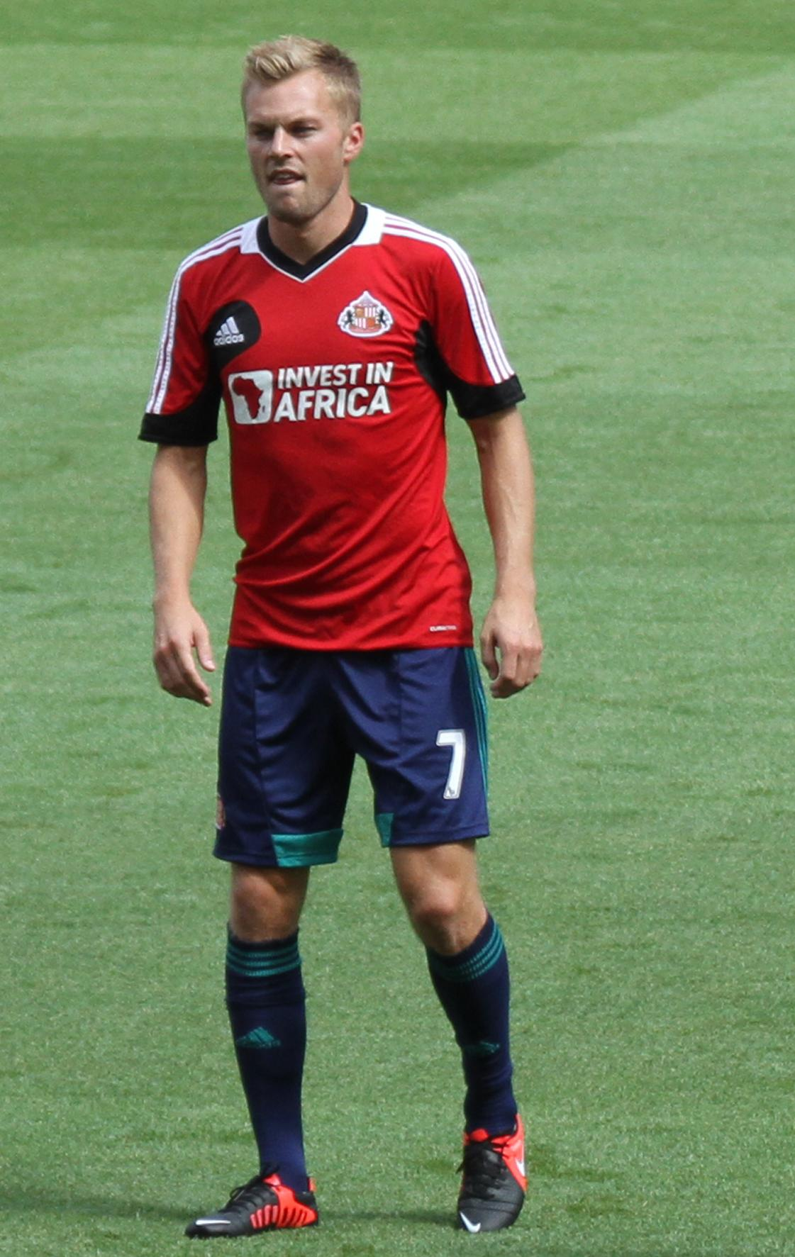 Sunderland Warm Up 1